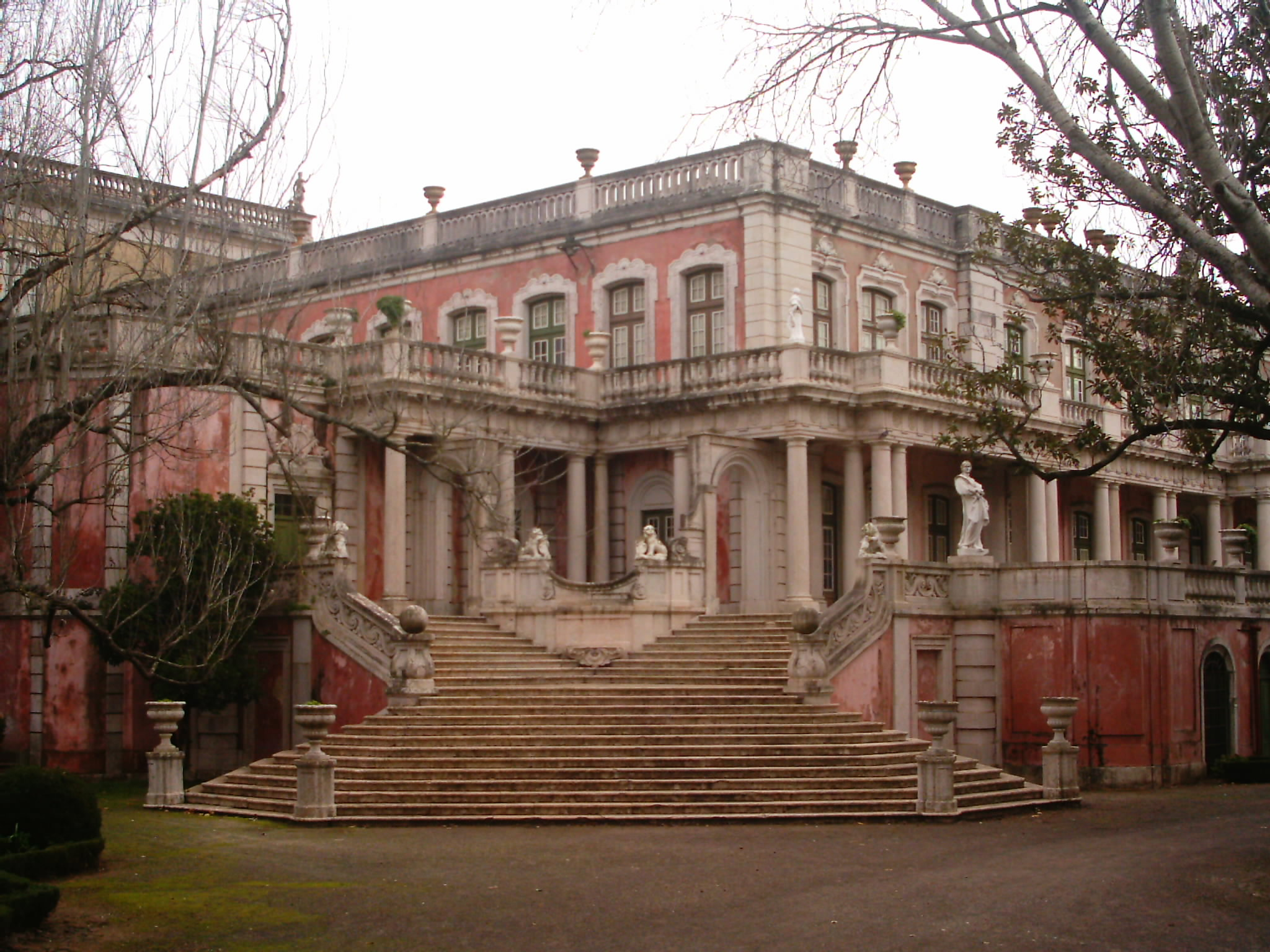 Palácio de Queluz, Portugal. Vista para o Pavilhão Robillion.